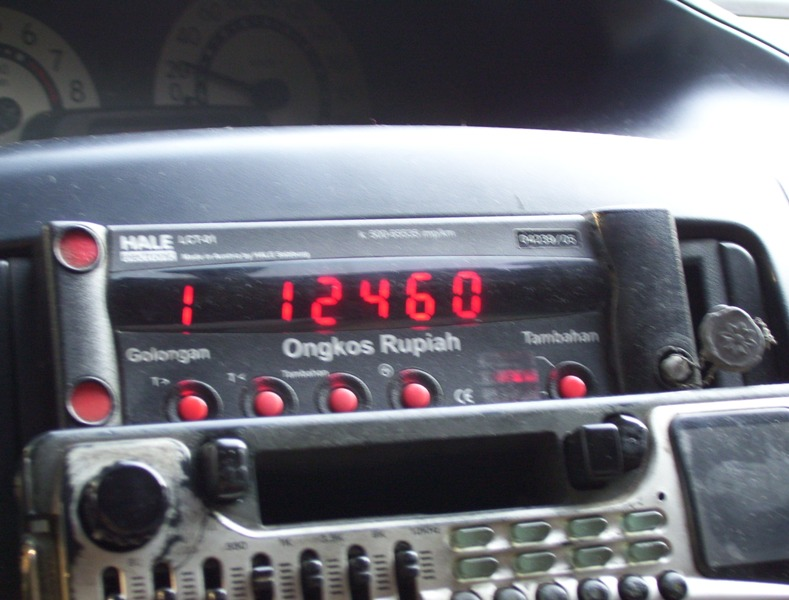 Taxi meter